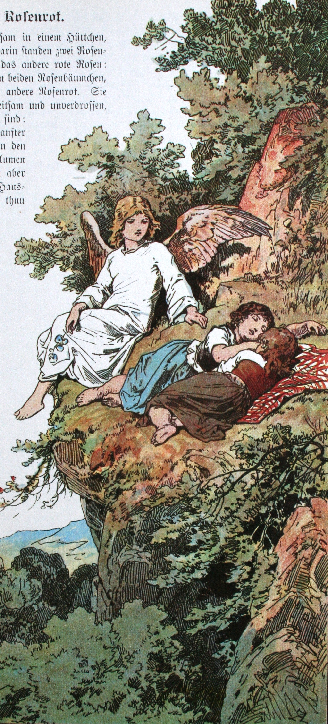 Schneeweißchen und Rosenrot; Darstellung von Alexander Zick (1845 - 1907)